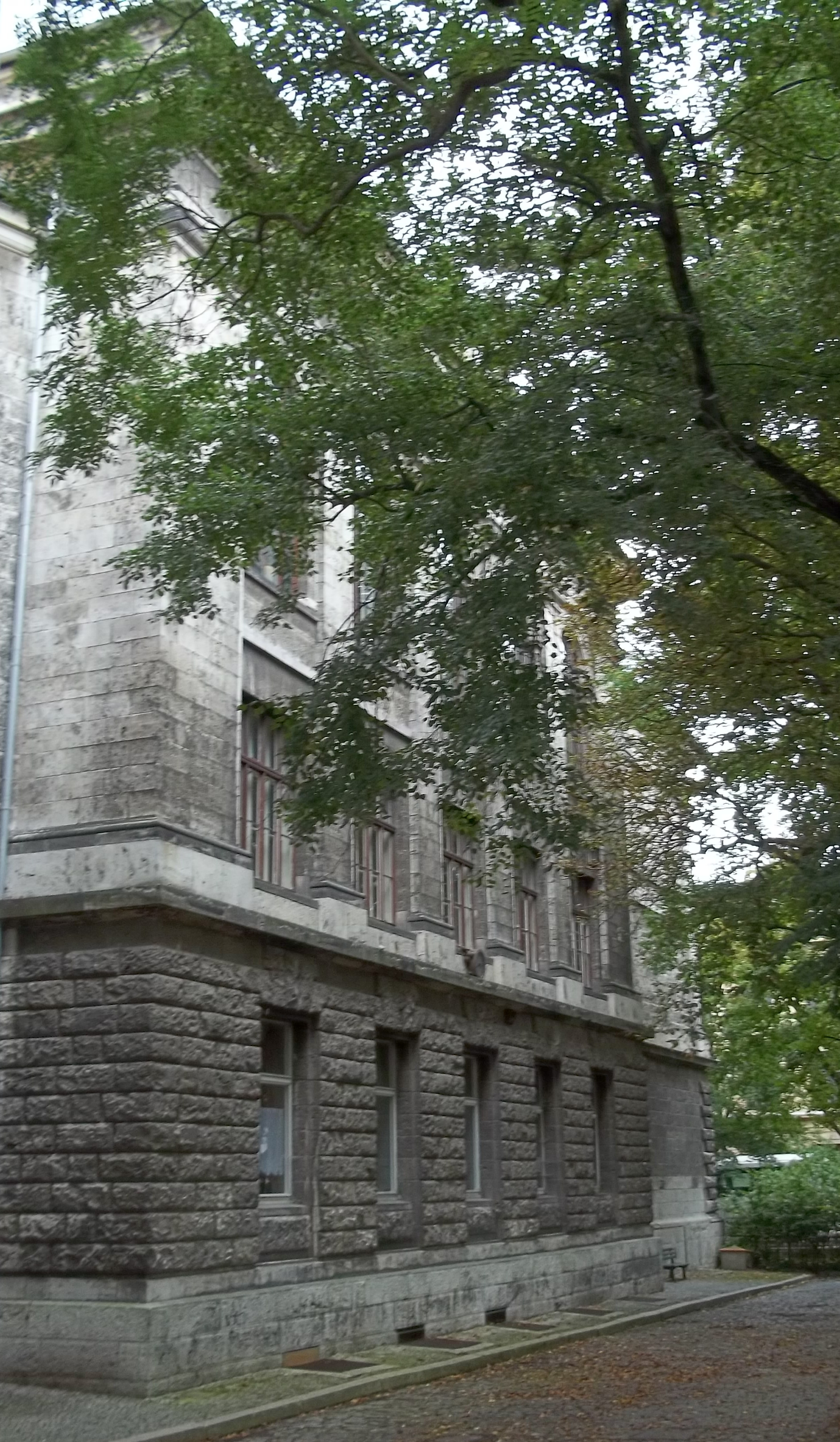 Das einstige Sophien-Gymnasium Weimar, vom Schultor an der Brennerstraße aus gesehen